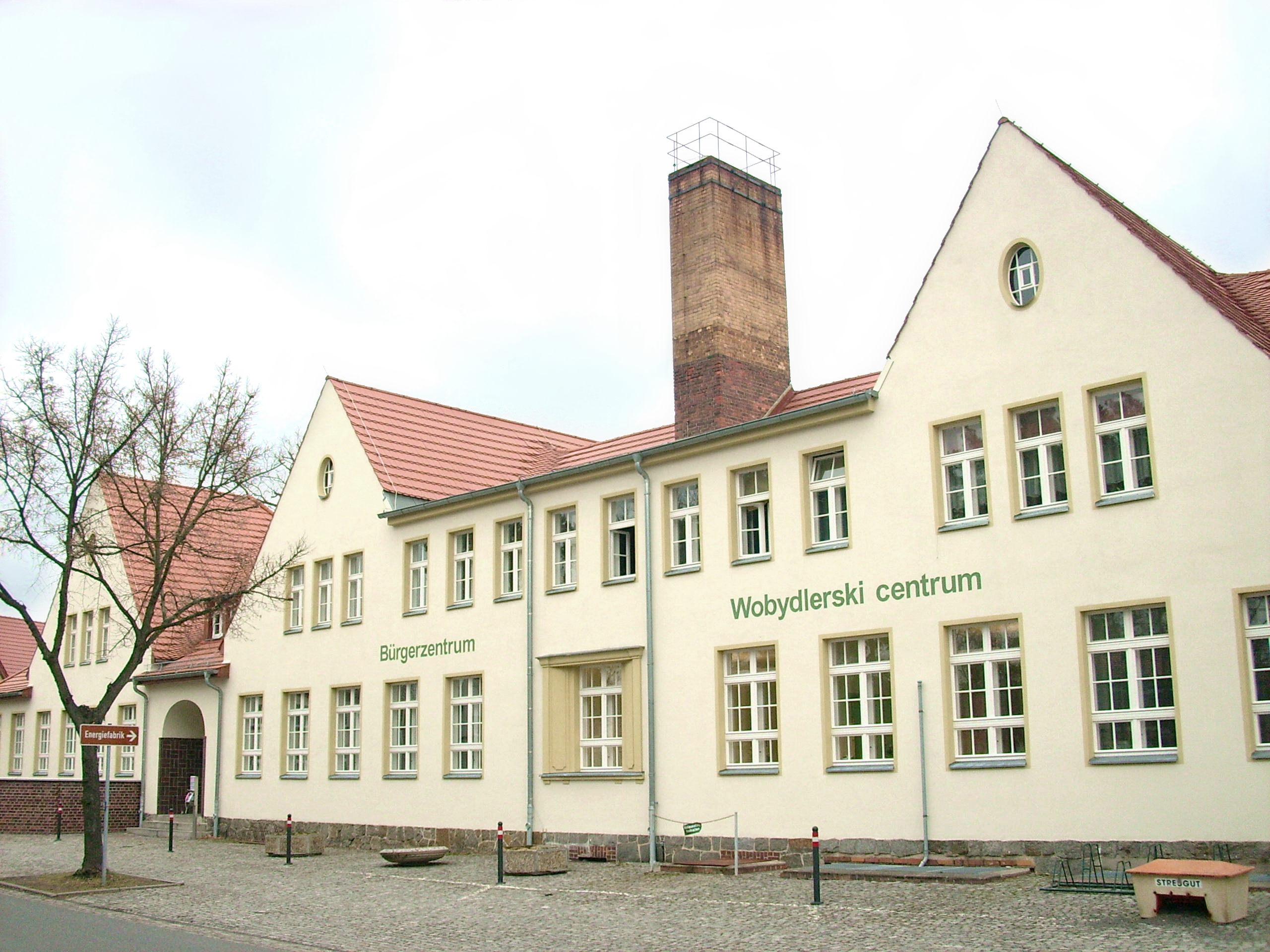 ehemalige Schule, heute Bürgerzentrum, Karl-Marx-Straße 1 in Knappenrode, Ortsteil von Hoyerswerda